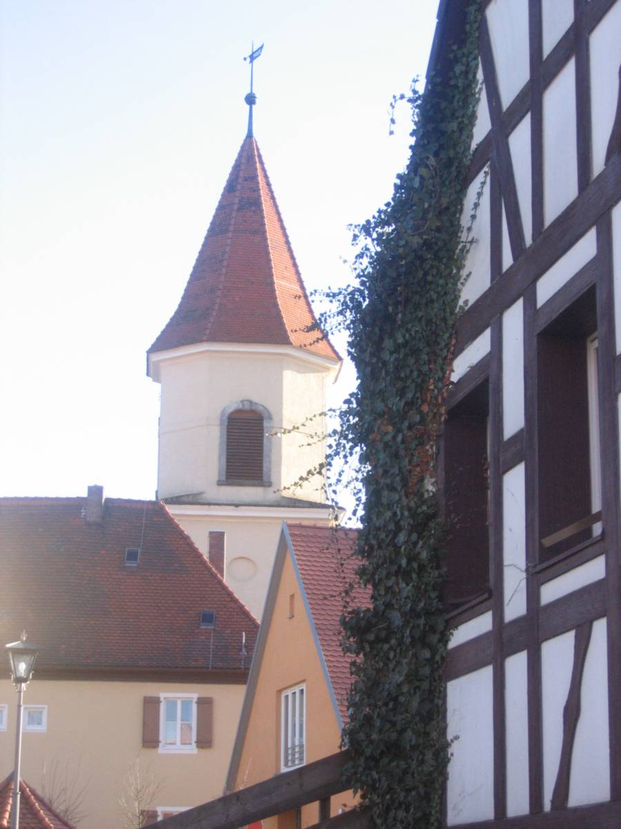 Die Kirche St.Martin in Schopfloch aus Sicht von Südwesten. Zur Linken läge der Kindergarten. Im Rücken geht es zum Judenfriedhof.